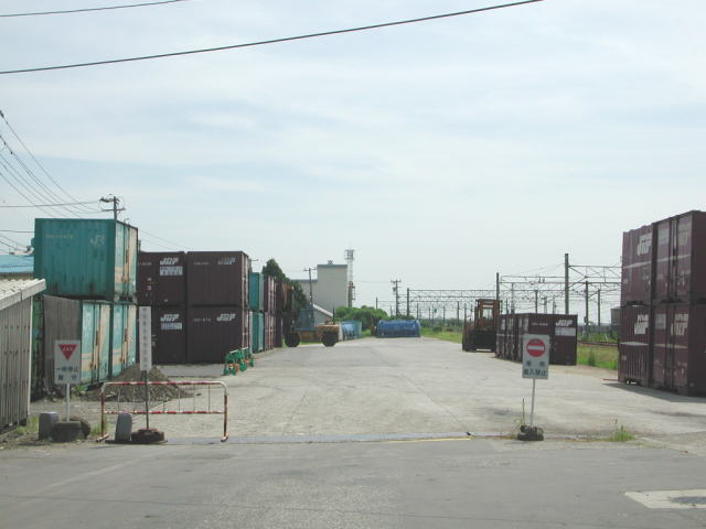 JR中条駅・コンテナヤード